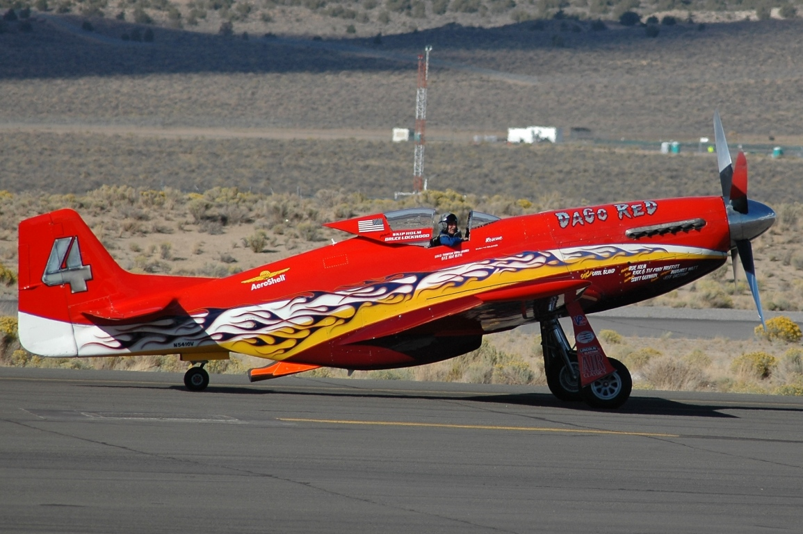 P-51D Mustang Dago Red